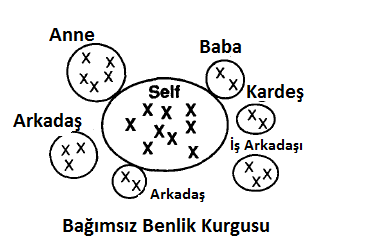 Bağımsız Benlik kurgusu